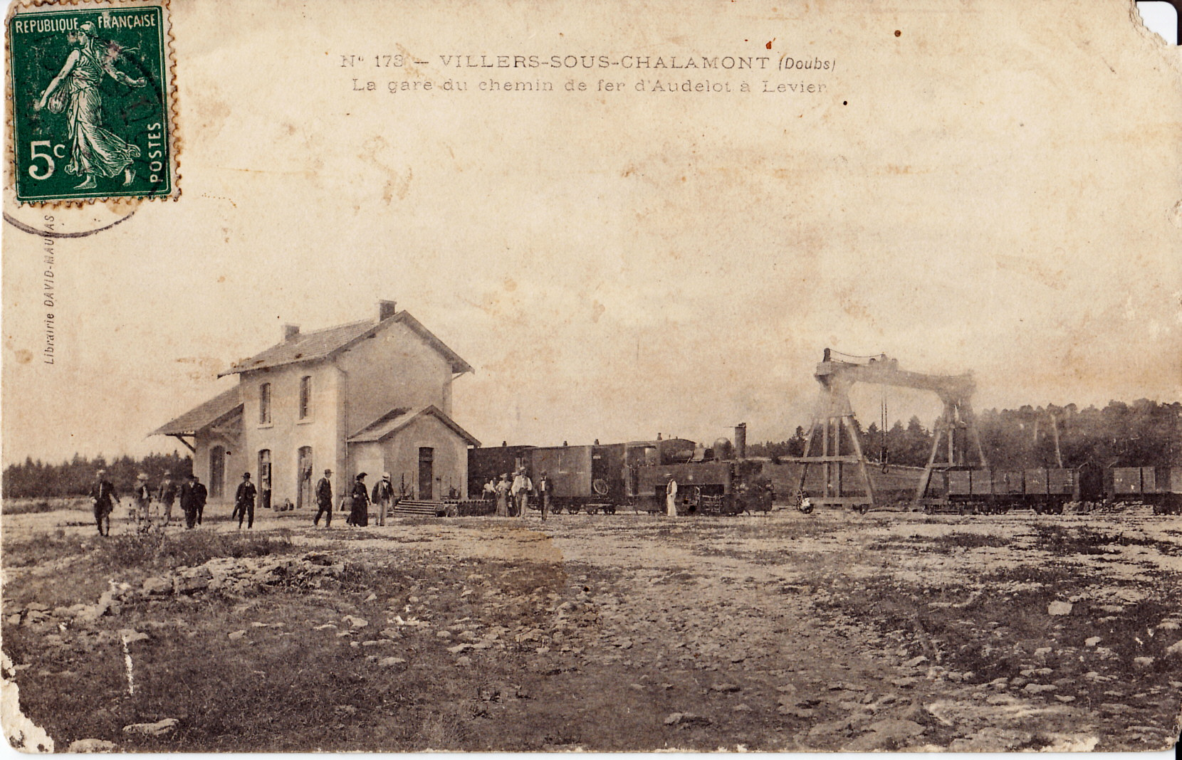 Carte postale ancienne éditée par Librairie David-Mauvas, n°178 : VILLERS-SOUS-CHALAMONT - La gare du chemin de fer d'Andelot à Levier